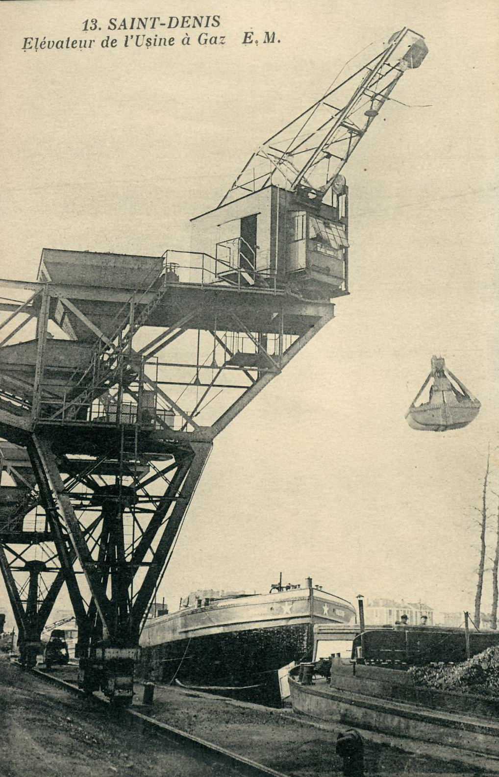 Carte postale ancienne éditée par EM N°13 Saint-Denis Élévateur de l'usine à gazLes usines à gaz de Saint Denis se trouvaient dans le quartier du Cornillon à la Plaine Saint-Denis, occupée aujourd'hui en partie par le Stade de France